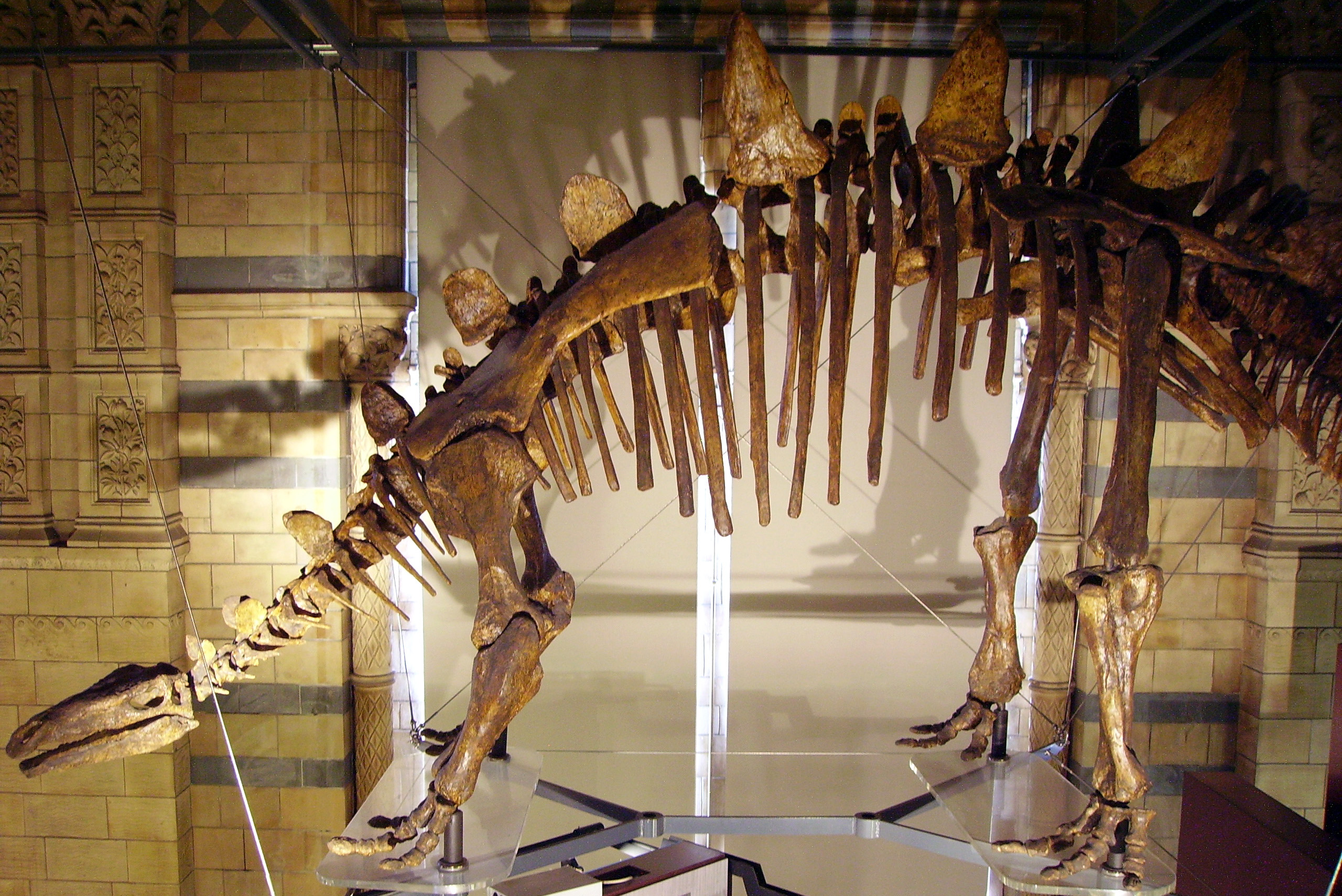 Tuojiangosaurus skeleton NHM.